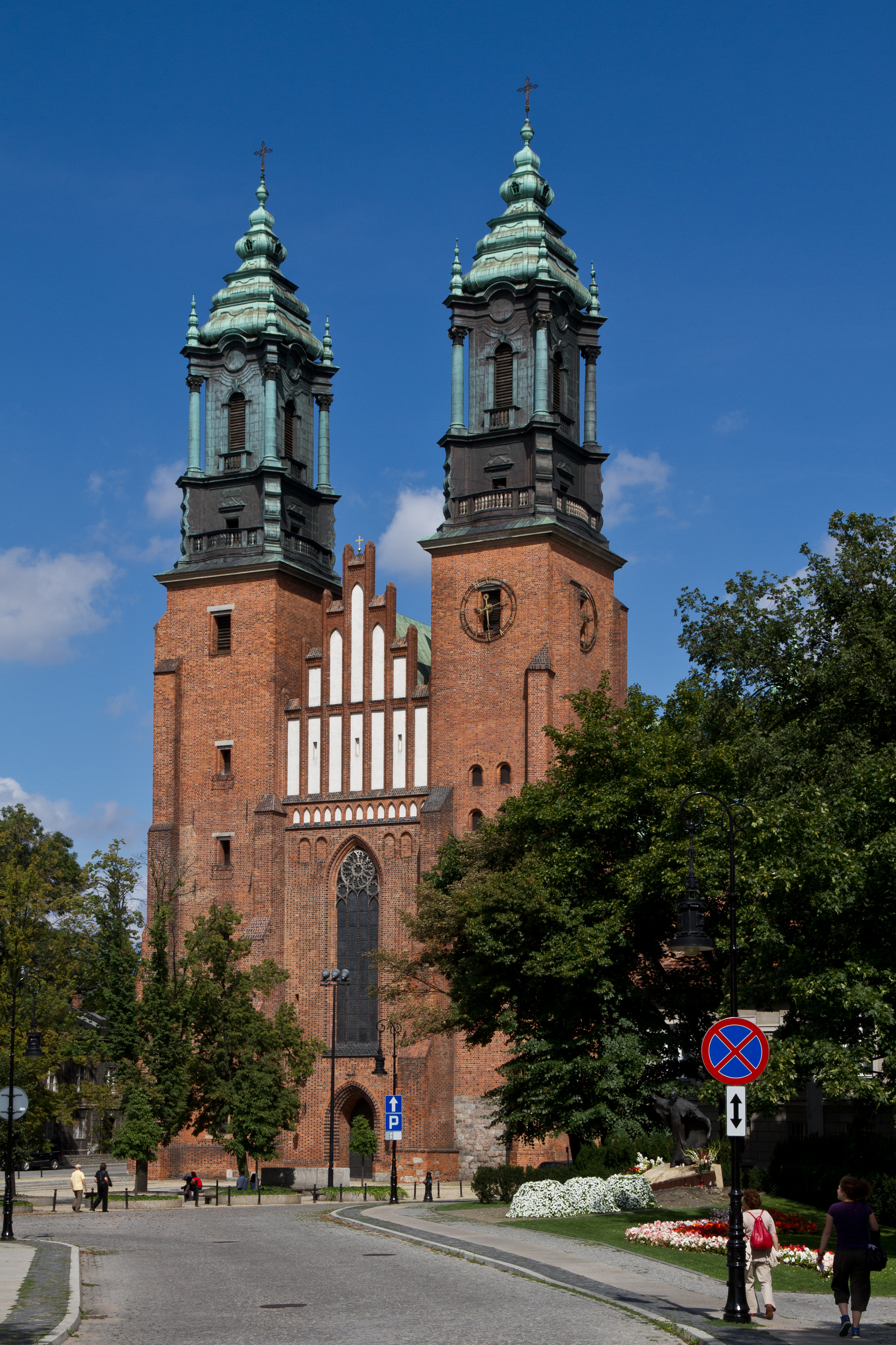 Poznań, Katedra pw. śś. Apostołów Piotra i Pawła